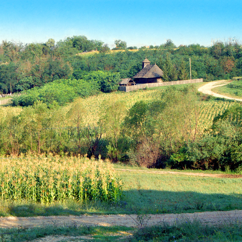 Comuna Leleasca, Olt, parohia Păroşi, biserica de lemn din satul Ştefăneşti. Vedere dinspre şosea.